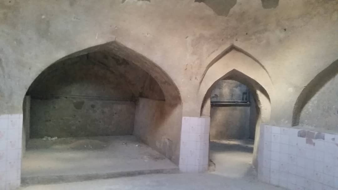 حمام کوشک قاضی